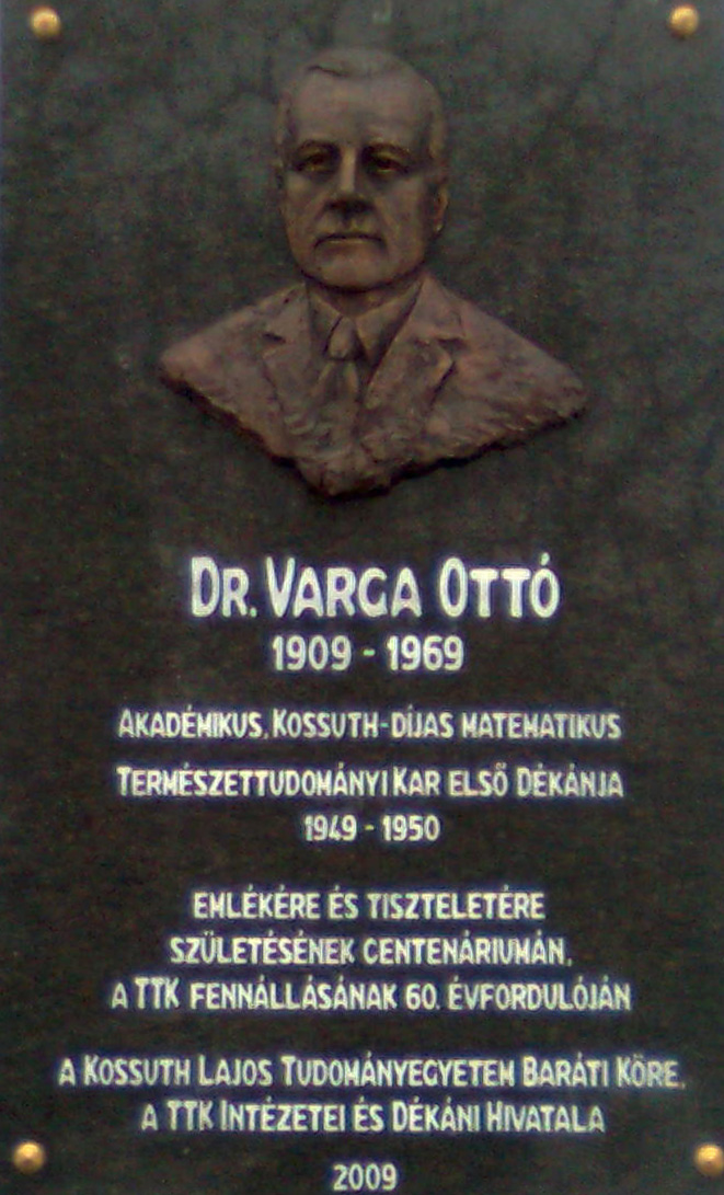 Varga Ottó matematikus (1909-1969) emléktáblája a Debreceni Egyetem Kémia-épületén; dr. Kövér József alkotása, felavatva 2009-ben